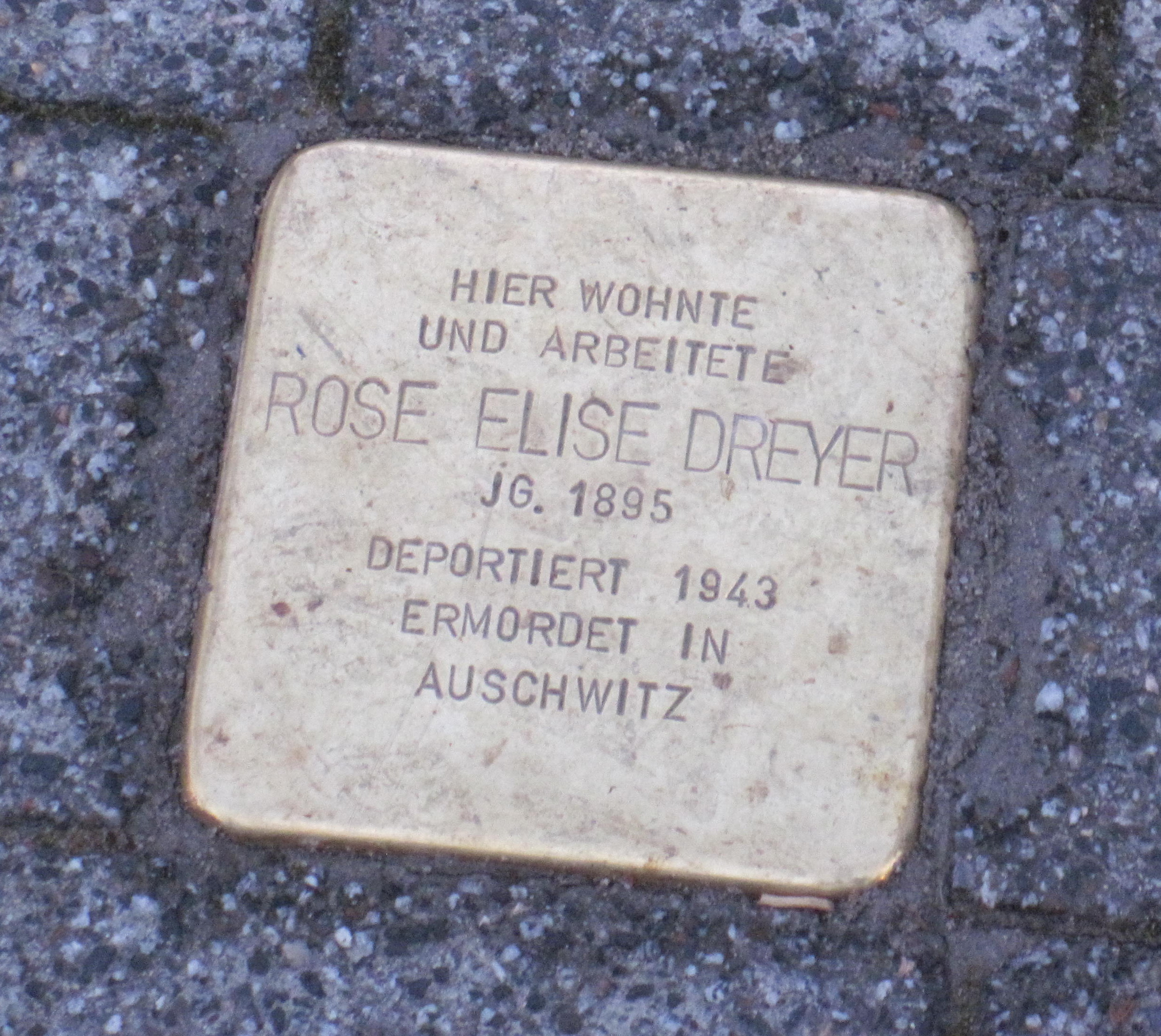 Stolperstein für Rose Elise Dreyer in Paderborn